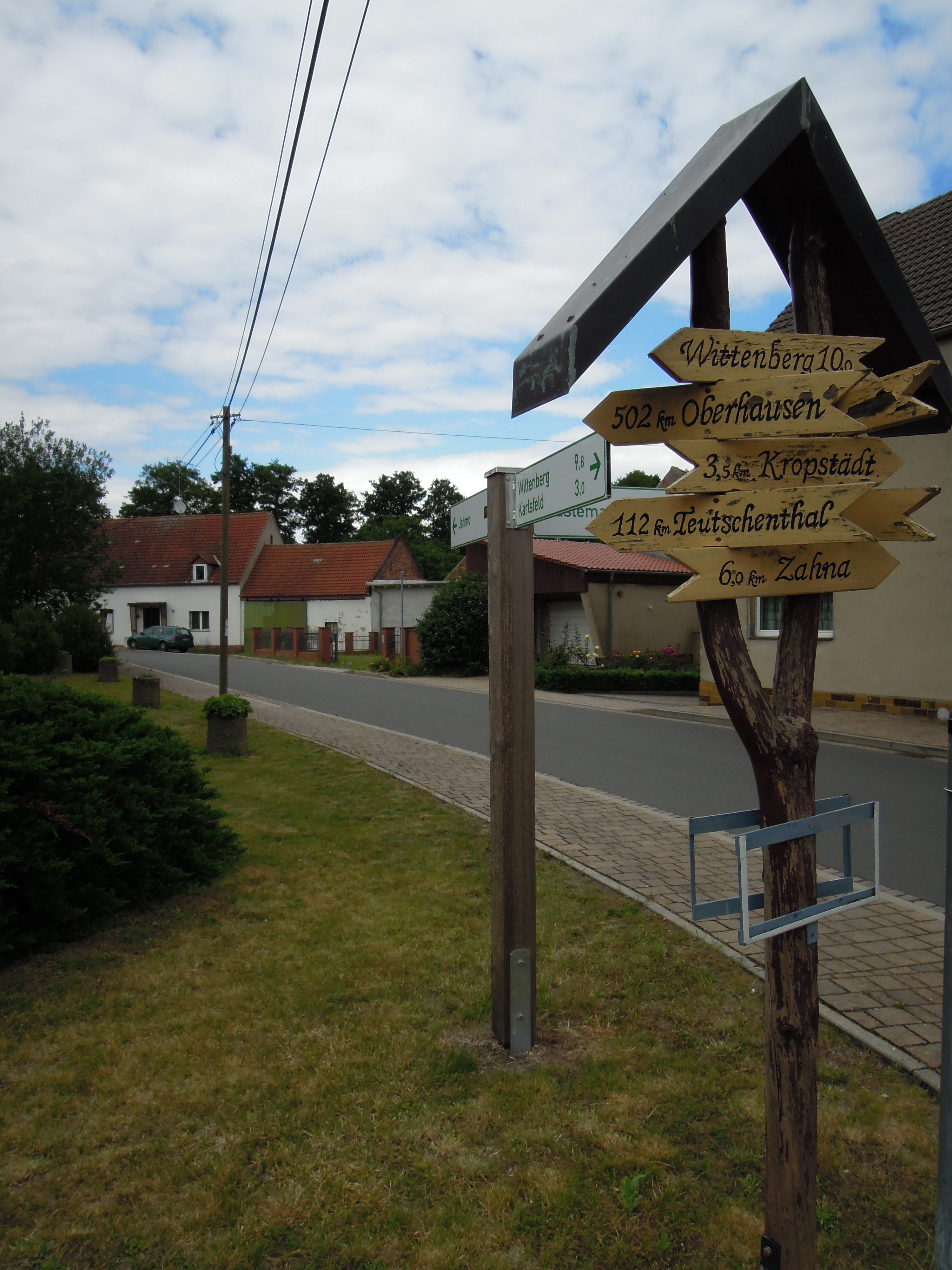 Köpnicks dorfmittige Wanderwegweiser im August 2020